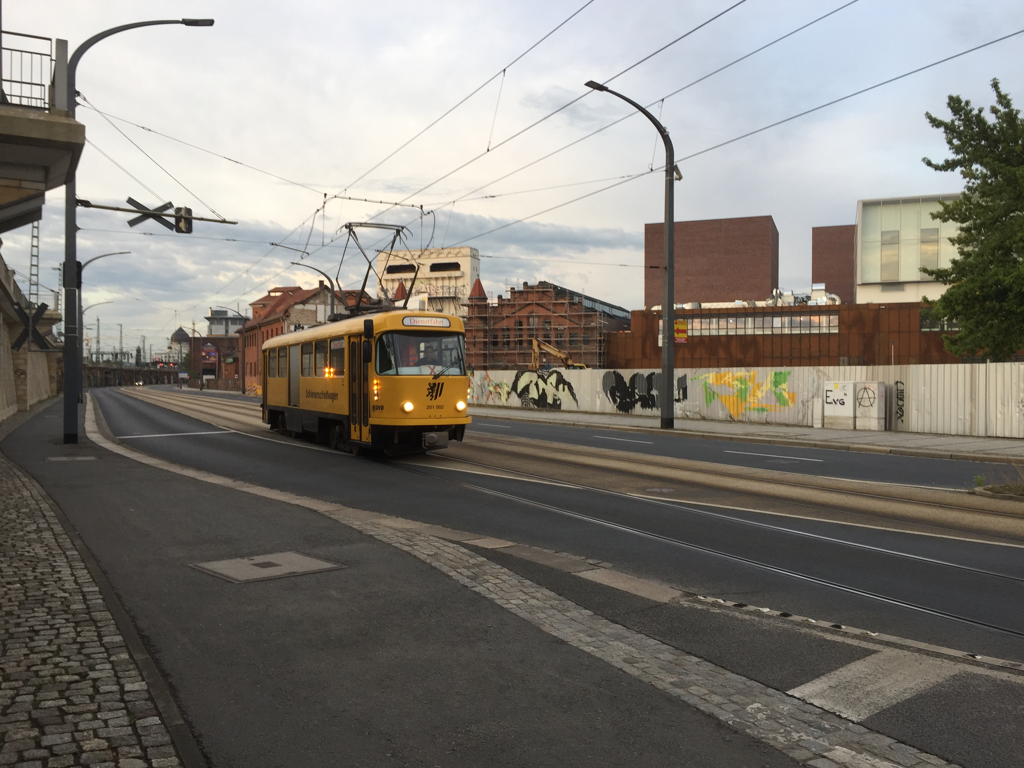 Schienenschleifwagen Dresden Könneritzstraße